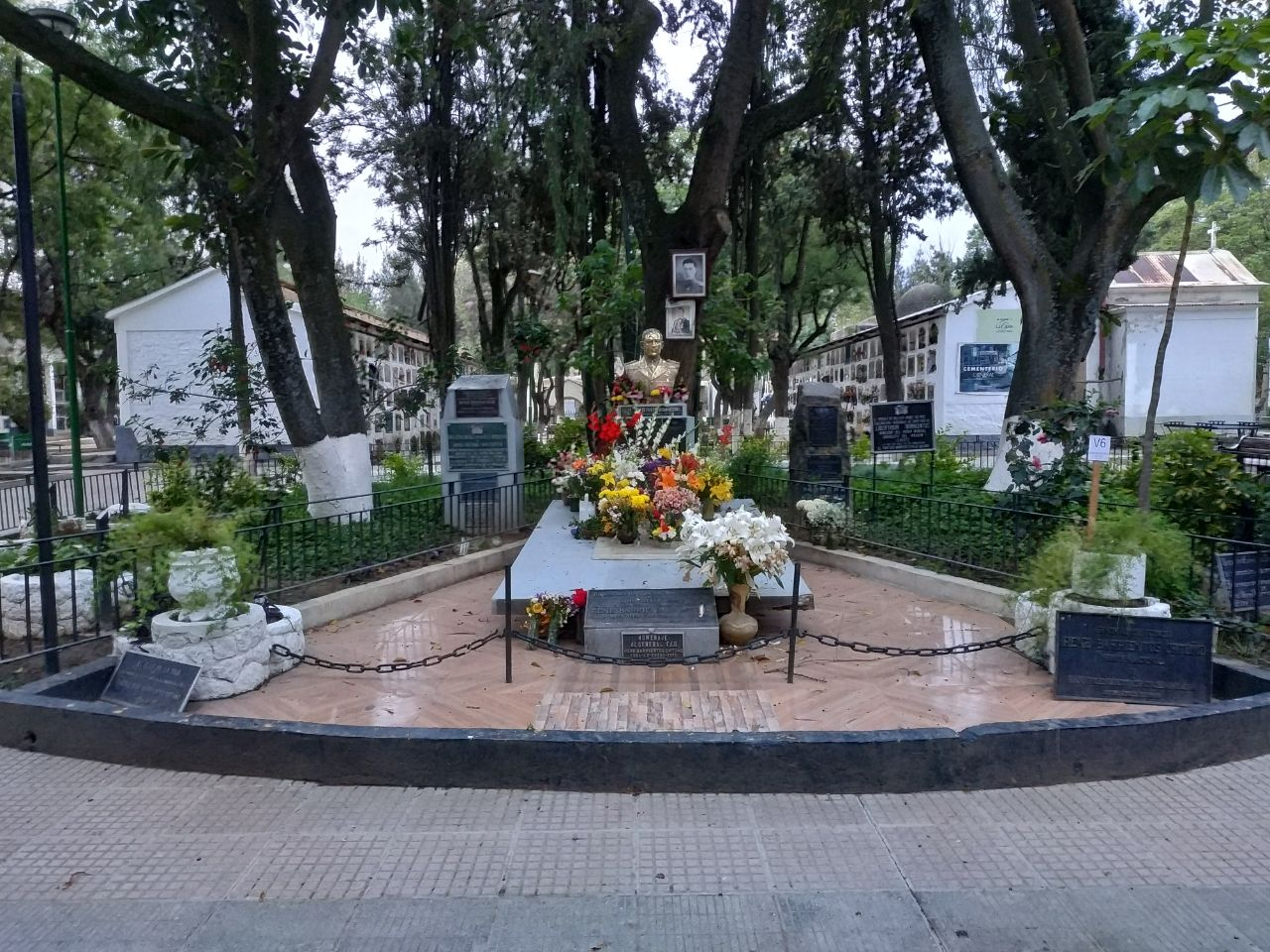 TUMBA DE NUESTRO EX PRESIDENTE RENE BARRIENTOS